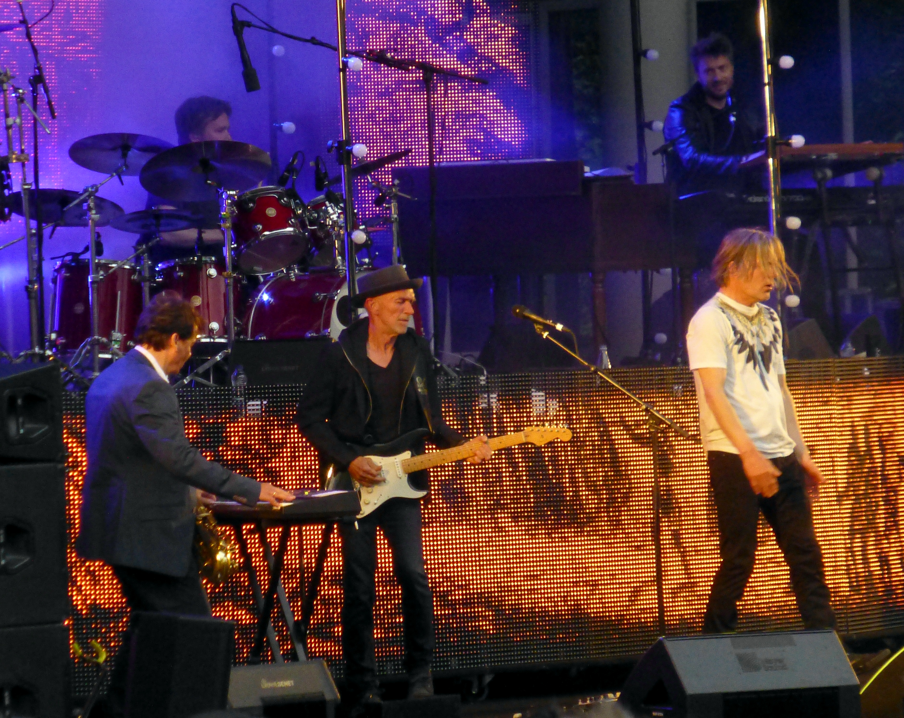 2015 tog Gnags på turneen Flashback Tour, med start i Friheden Aarhus 22 maj 2015